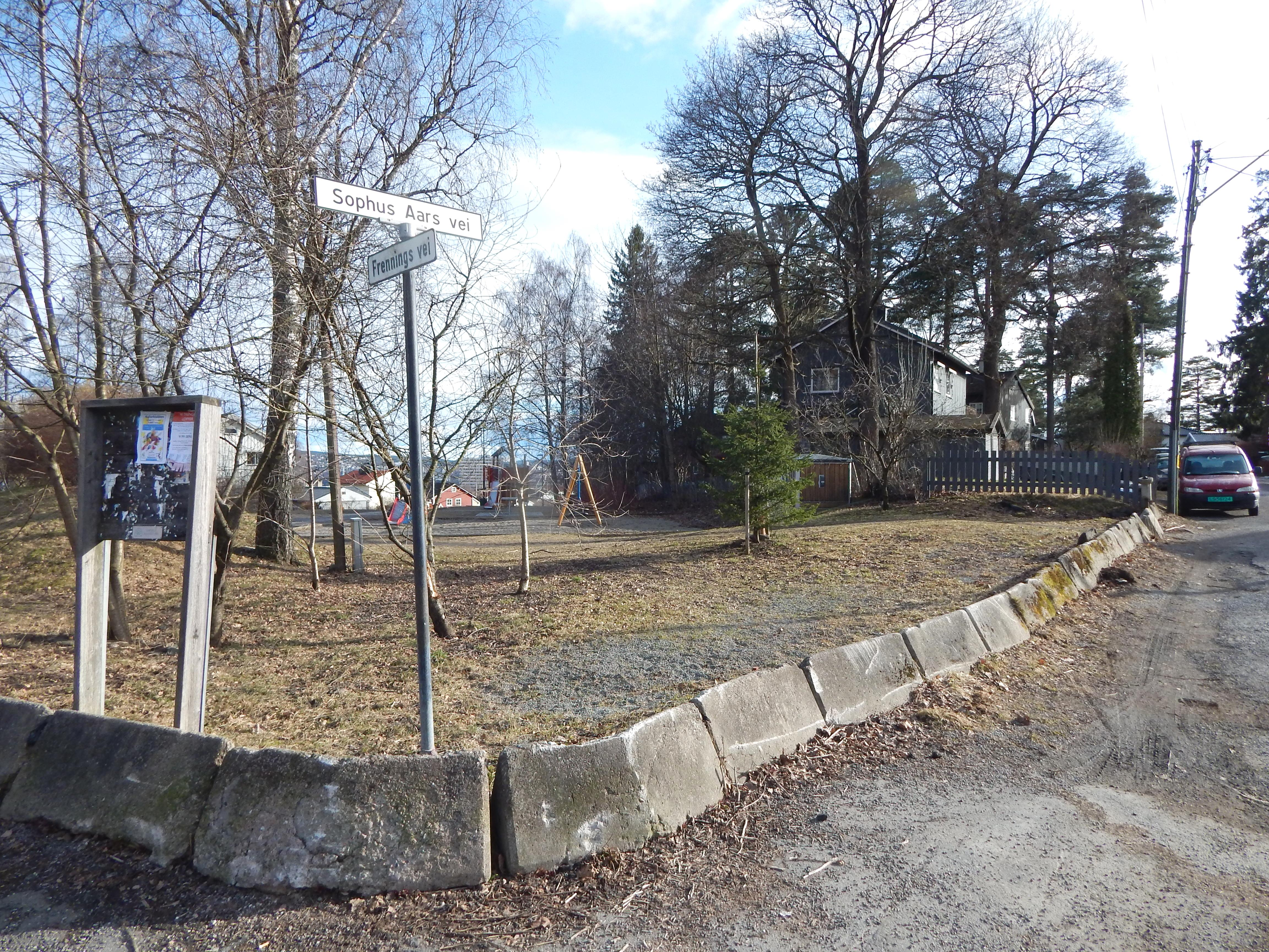 Sophus Aars' vei i enden mot Frennings vei